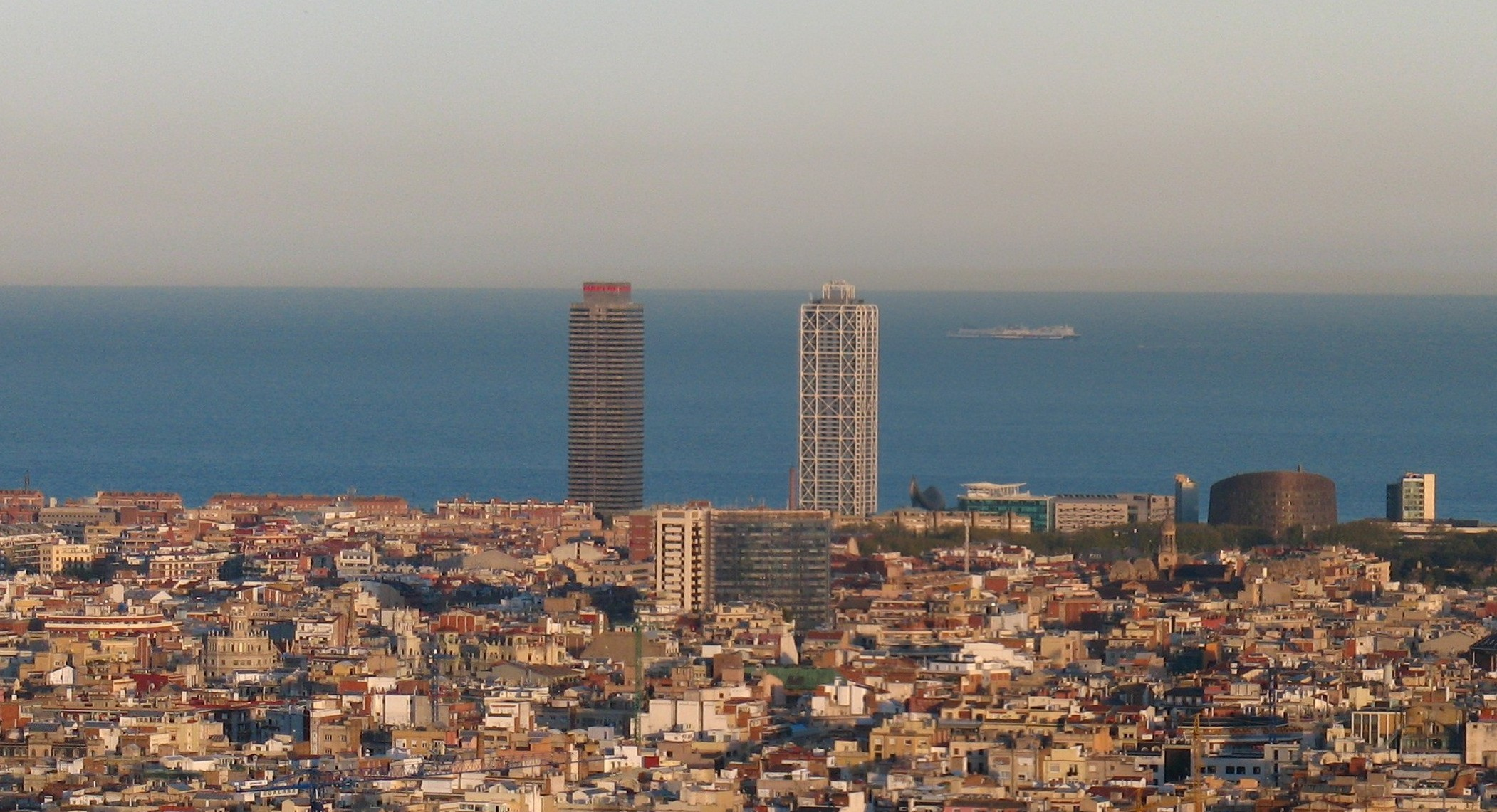 Torre Mapfre y Hotel Arts vistos desde el parque del Putxet.